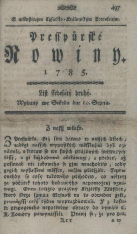 Titulný list periodika Presspůrske nowiny z 18. storočia.